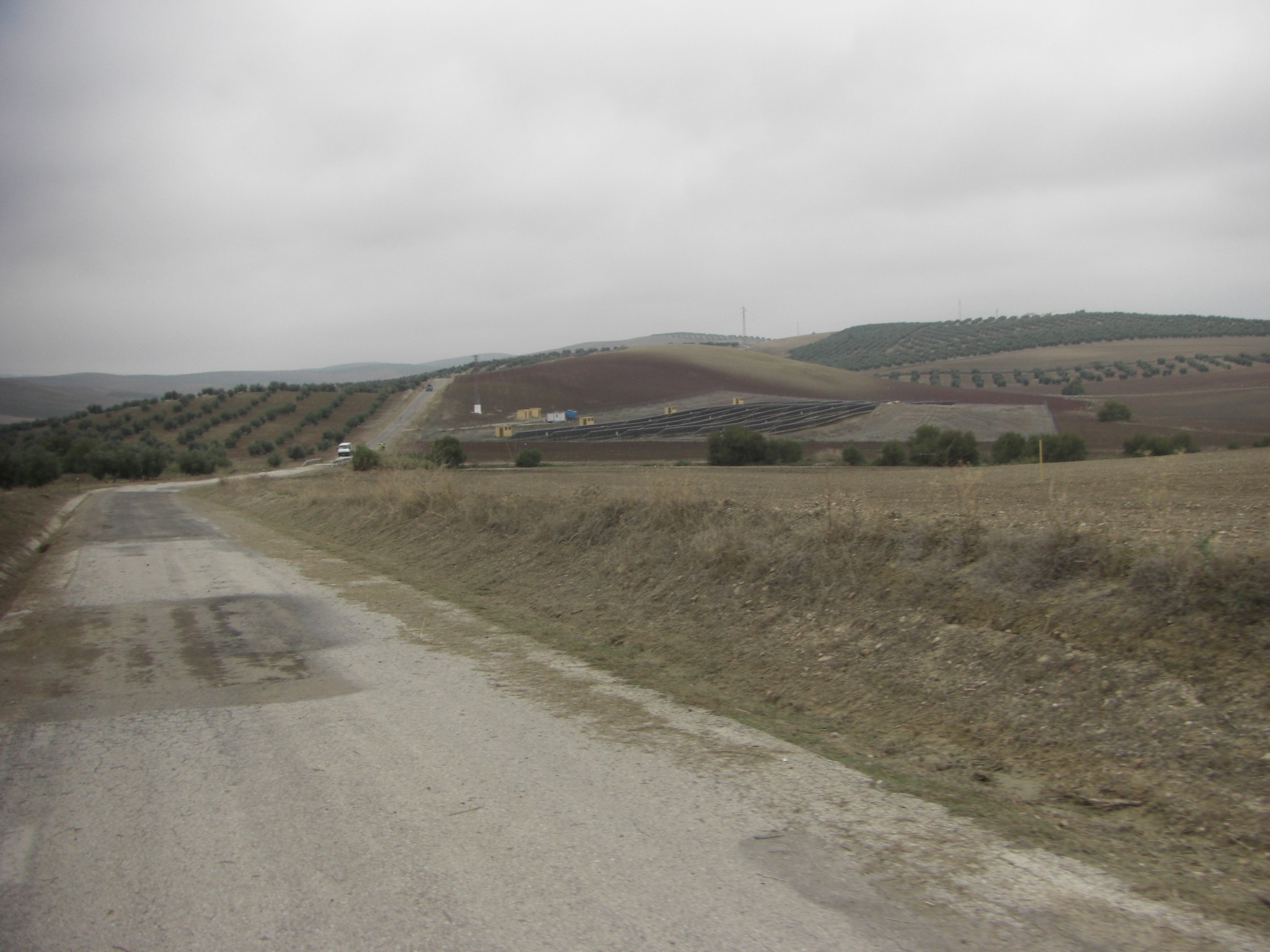 Vista hacia el Oeste de la carretera local JV-2305, que conecta la aldea de Ventosilla con el barrio jiennense de Las Infantas.